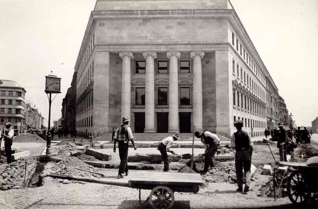 Viktor Kovačić- Palača Burze, Trg Burze, Zagreb, 1922- 1927.